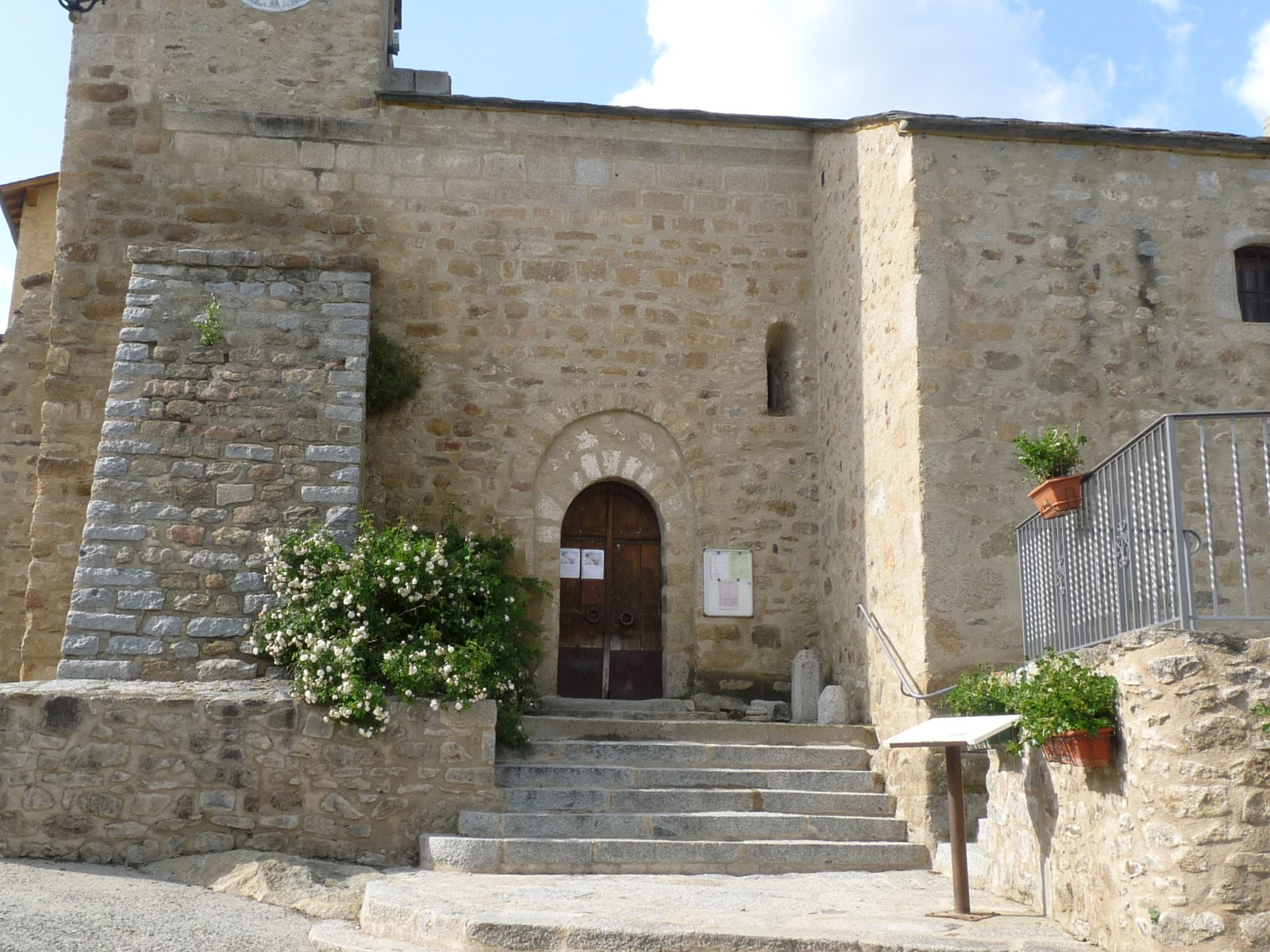 Eglise de Dorres, Pyrénées-Orientales, France